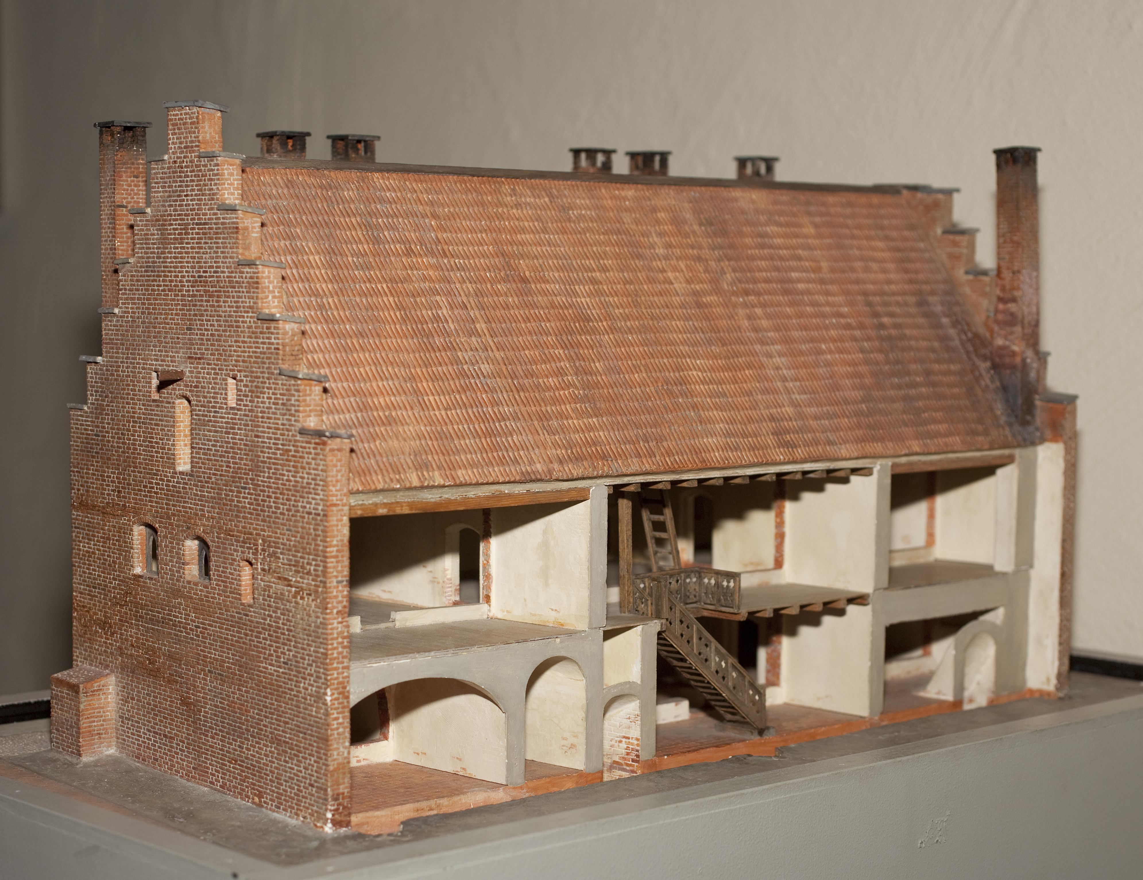 Modellen visande Själagården. Modellen är tillverkad av M Schärman och A Seger och finns på Medeltidsmuseet